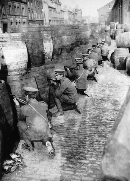 Dublin im April 2016 - Osteraufstand - britische Soldaten hinter einer Barrikade aus Fässern